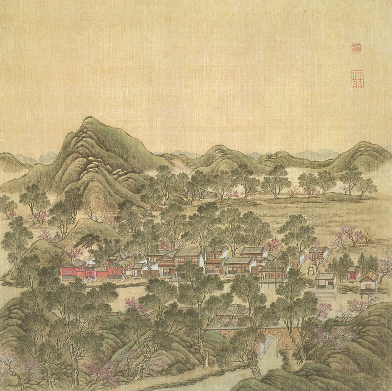 北遠山村 Běi yuǎn shān cūn